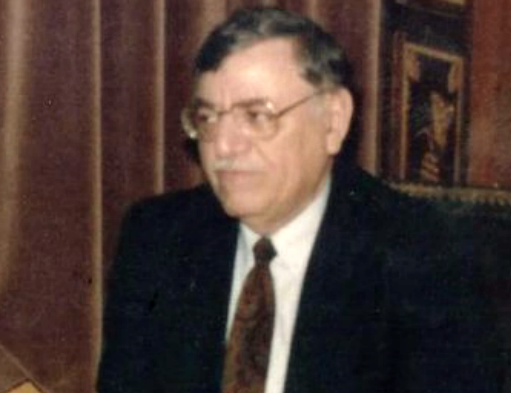 שר הדתות, שגריר ישראל במצרים ודנה בביקור אצל באבא שנוצה, ראש הקופטים בעולם היושב במצרים